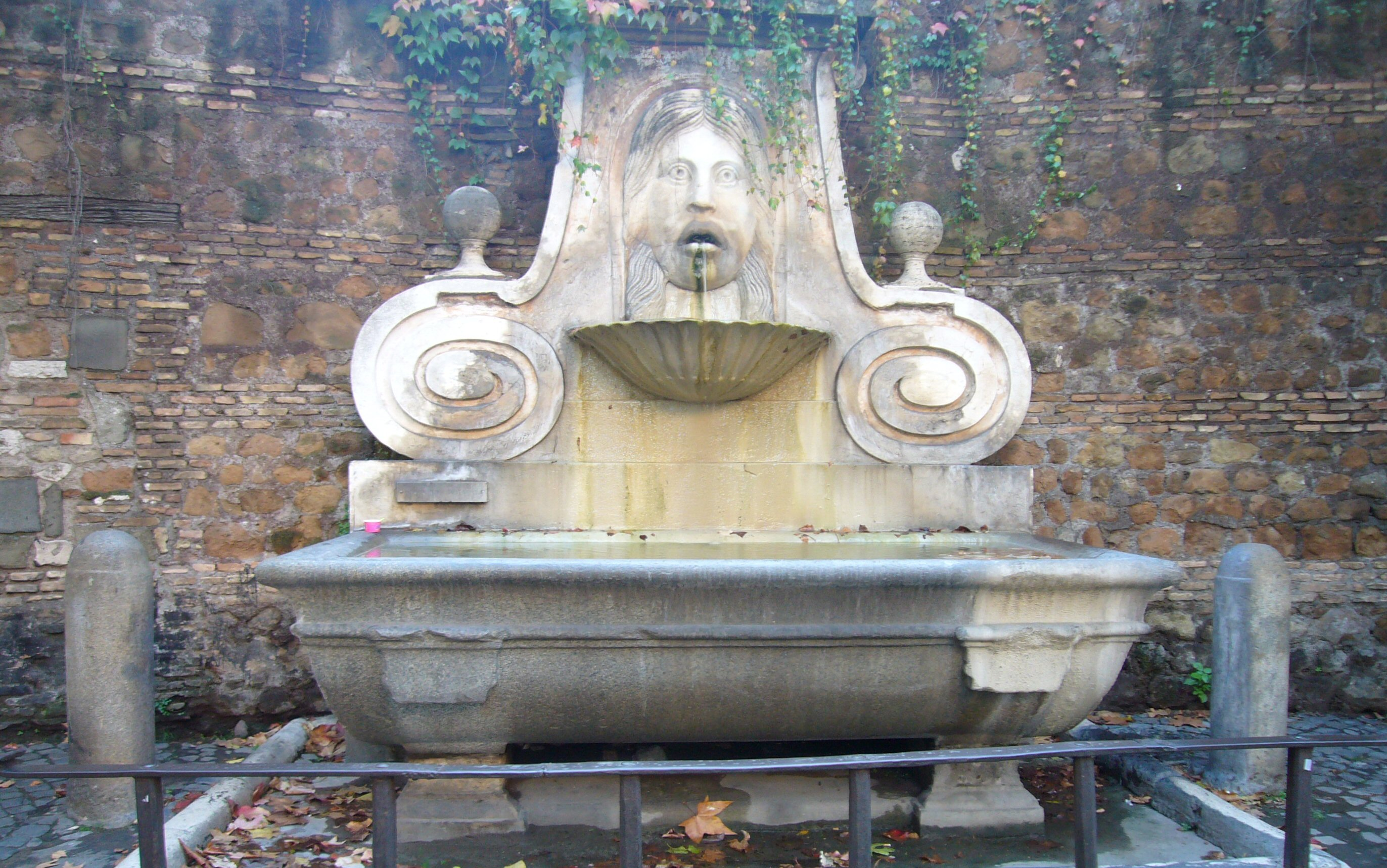 Roma, Fontana del Mascherone a via Giulia